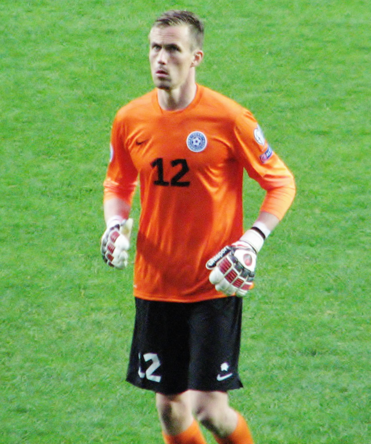 Mihkel Aksalu Eesti - San Marino mängus väravavahina